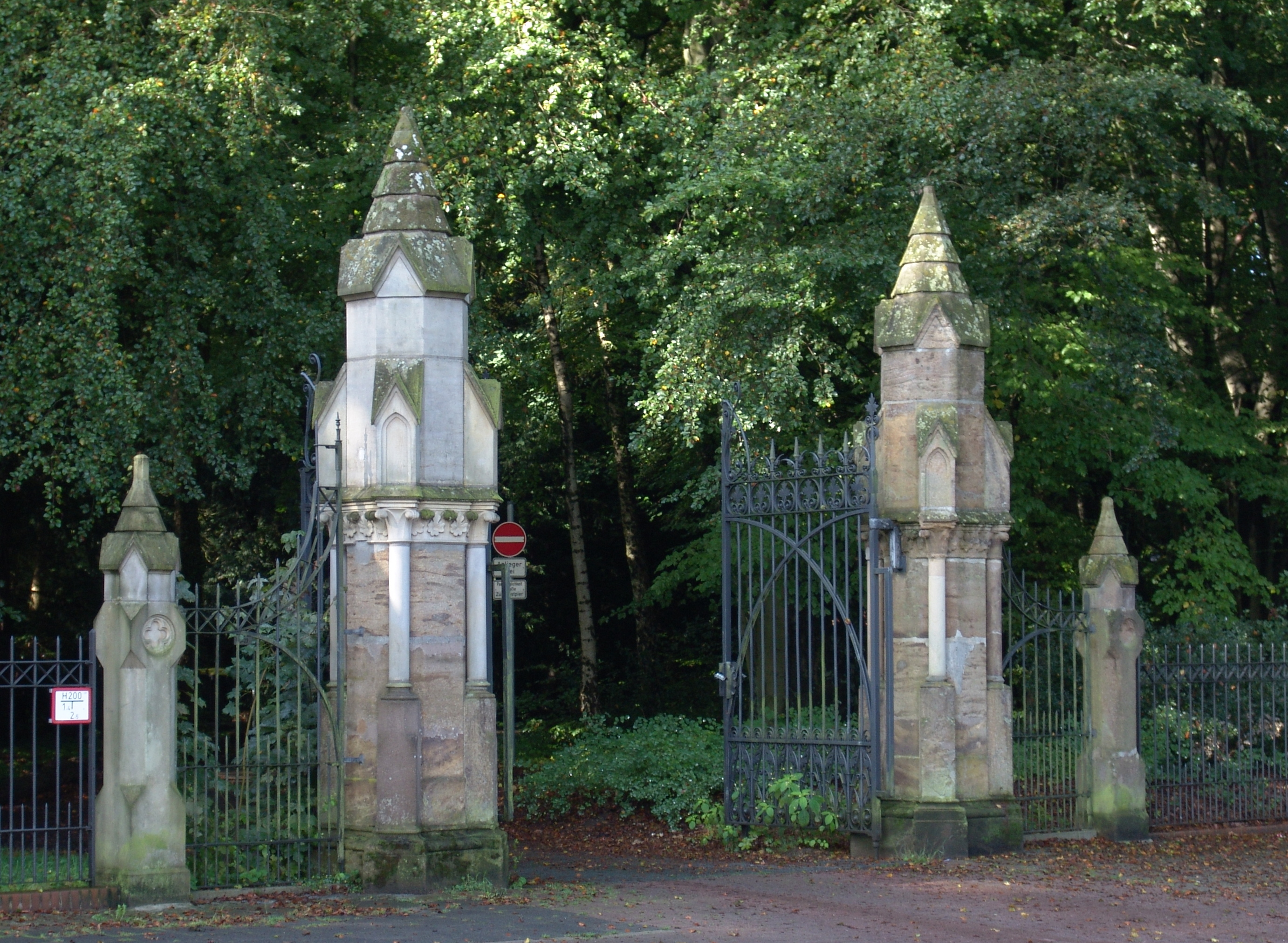 Wätjens Landgut, Haupttor, Bremen, Landrat-Christians-Straße.Das abgebildete Objekt ist ein geschütztes Kulturdenkmal in der Freien Hansestadt Bremen, mit der Nr. 1768 beim Landesamt für Denkmalpflege registriert.